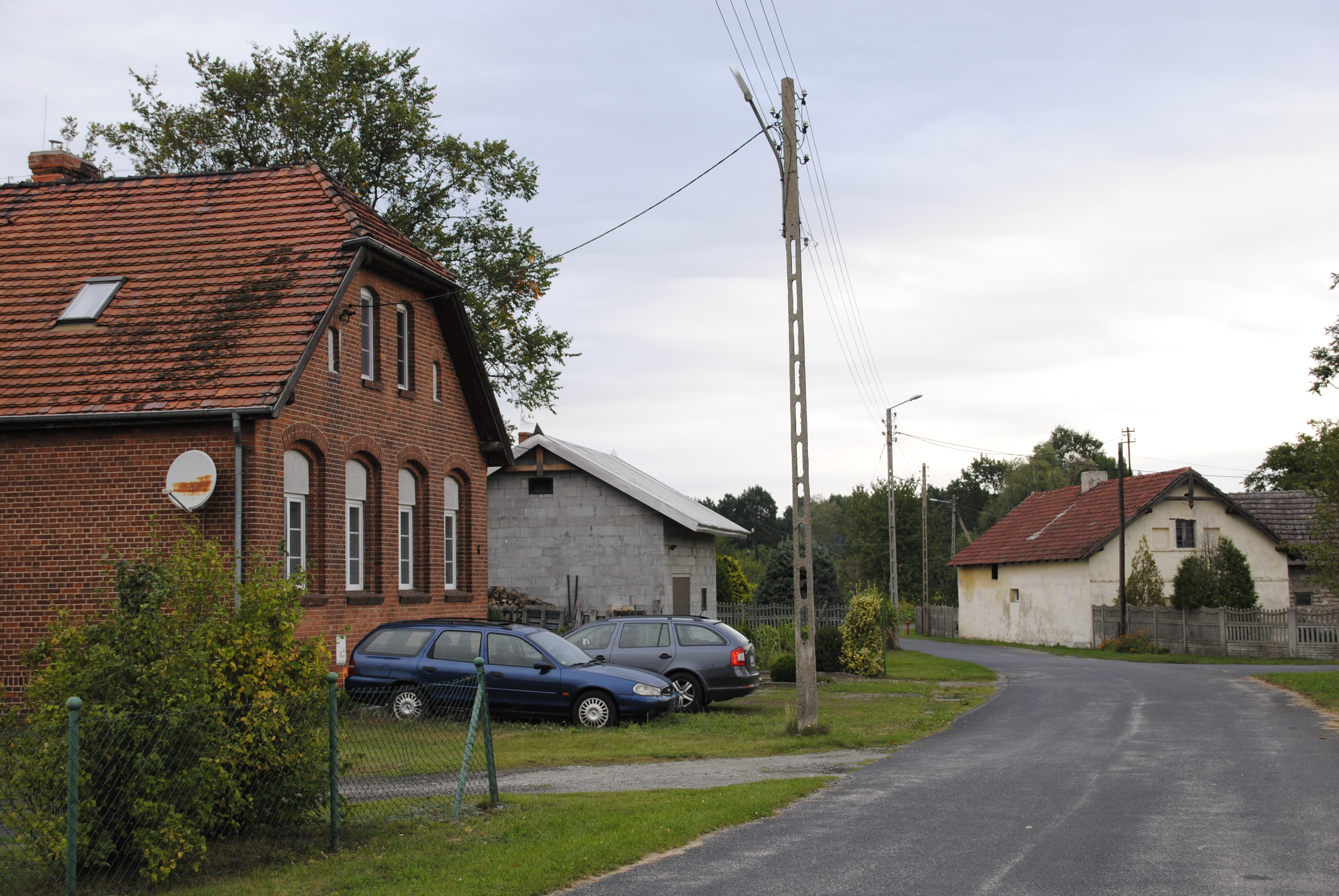 Straßenpartie an der ul. Szkolna in Kolanowice (dt. Kollanowitz)